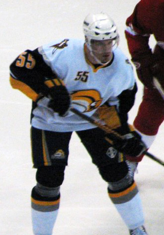 Eishockeyspieler Jochen Hecht von den Buffalo Sabres